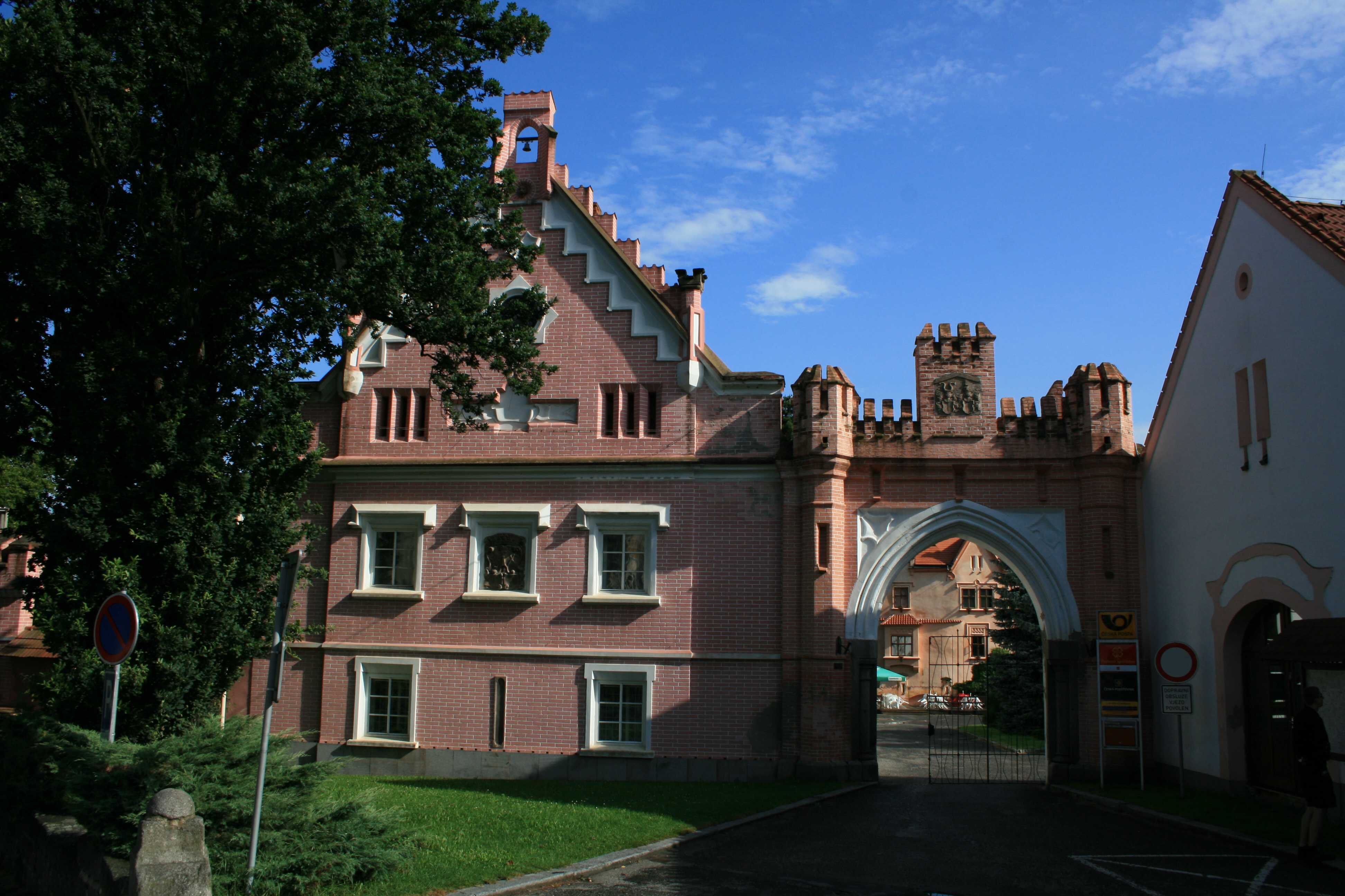 Zámek Vrchotovy Janovice